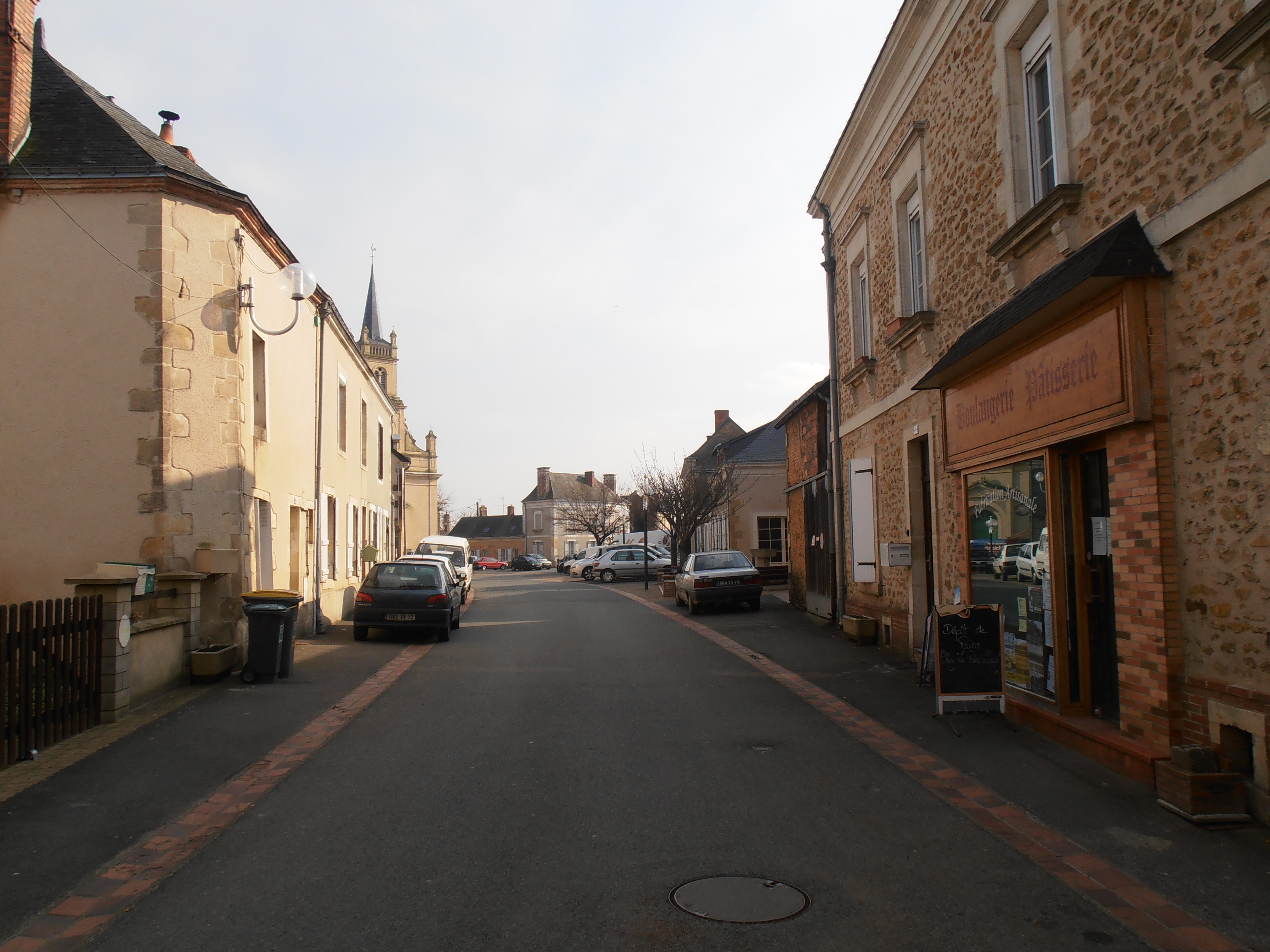 La rue principale du village où se situent les commerces, l'église et la mairie